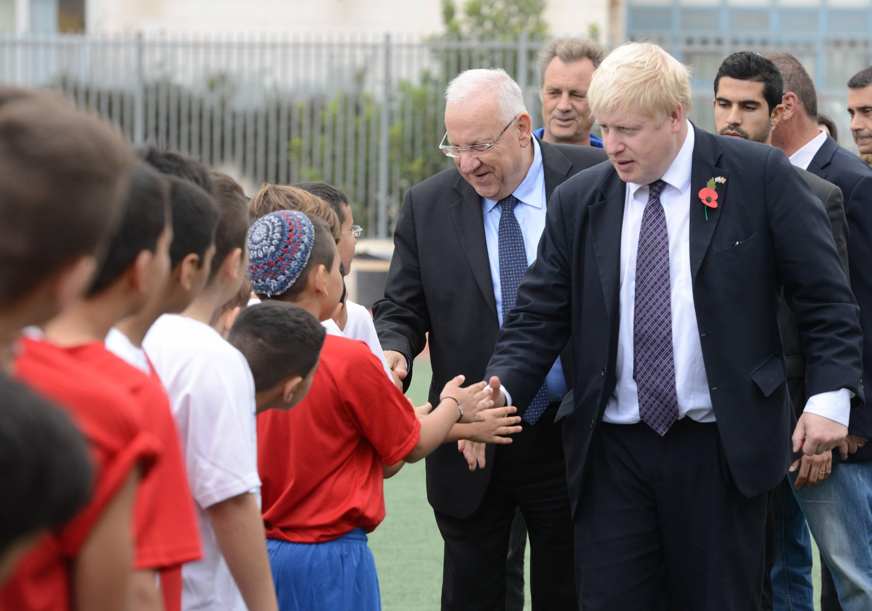 נשיא מדינת ישראל ראובן ריבלין עם ראש עיריית לונדון בוריס ג'ונסון, באירוע פתיחת עונת הכדורגל של עמותת הכדורגל של הילדים "שער שוויון"